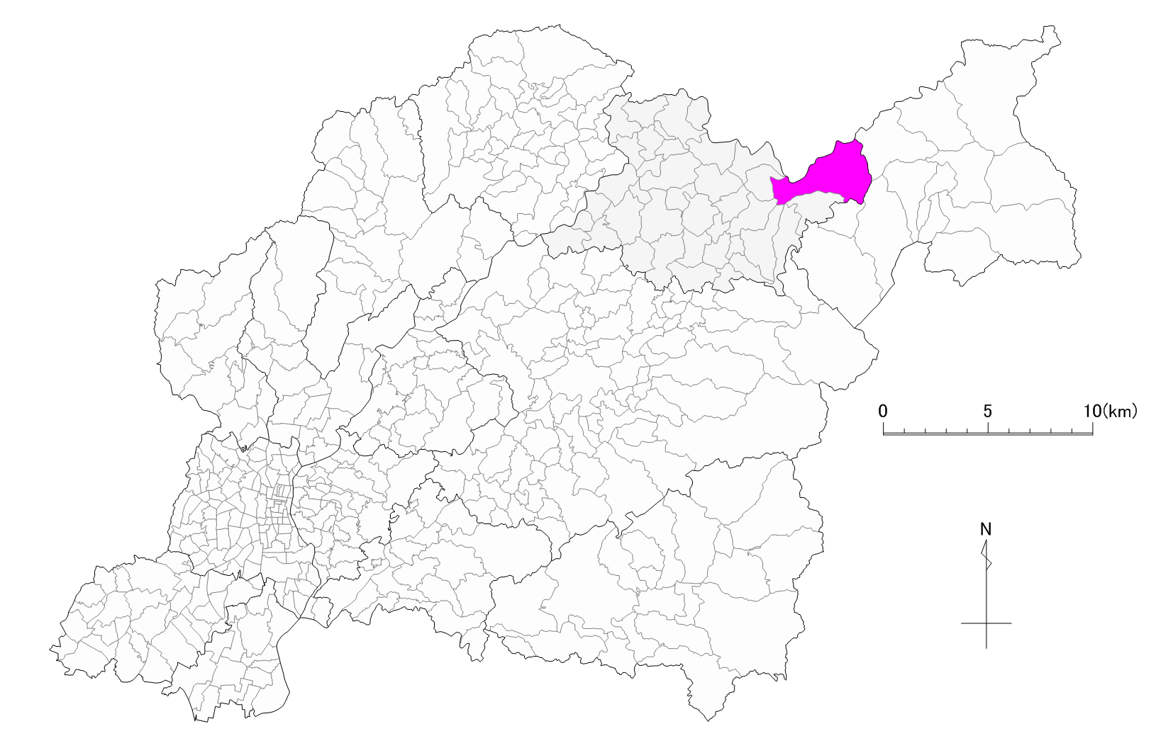 豊田市牛地町位置図